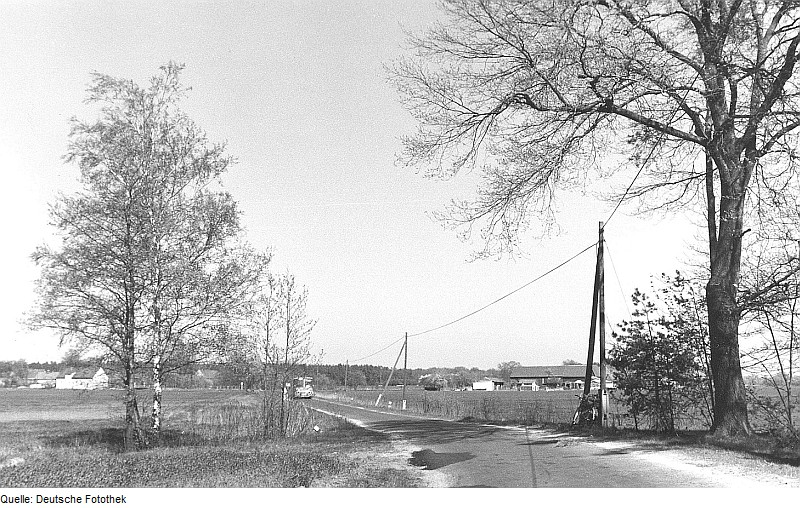 Original image description from the Deutsche Fotothek Rietschen-Viereichen. Ehem. Mühlenstandort, rechts der Straße, Häusergruppe Linda